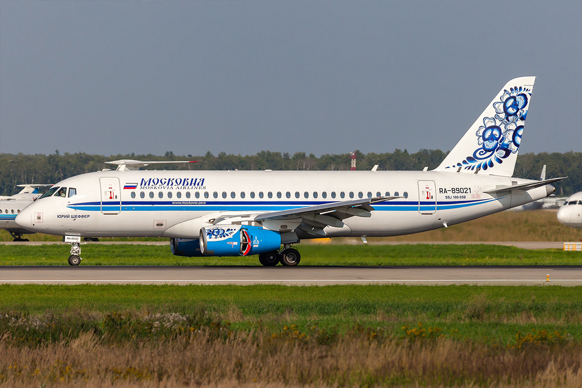 Moskovia Airlines Sukhoi Superjet 100-95B (RA-89021 / cn 95021) at Moscow Domodedovo - UUDD. First landing in UUDD on the flight from UUBW where it was painted in Moscowia/Gromov Air colors. Ex ArmAvia.